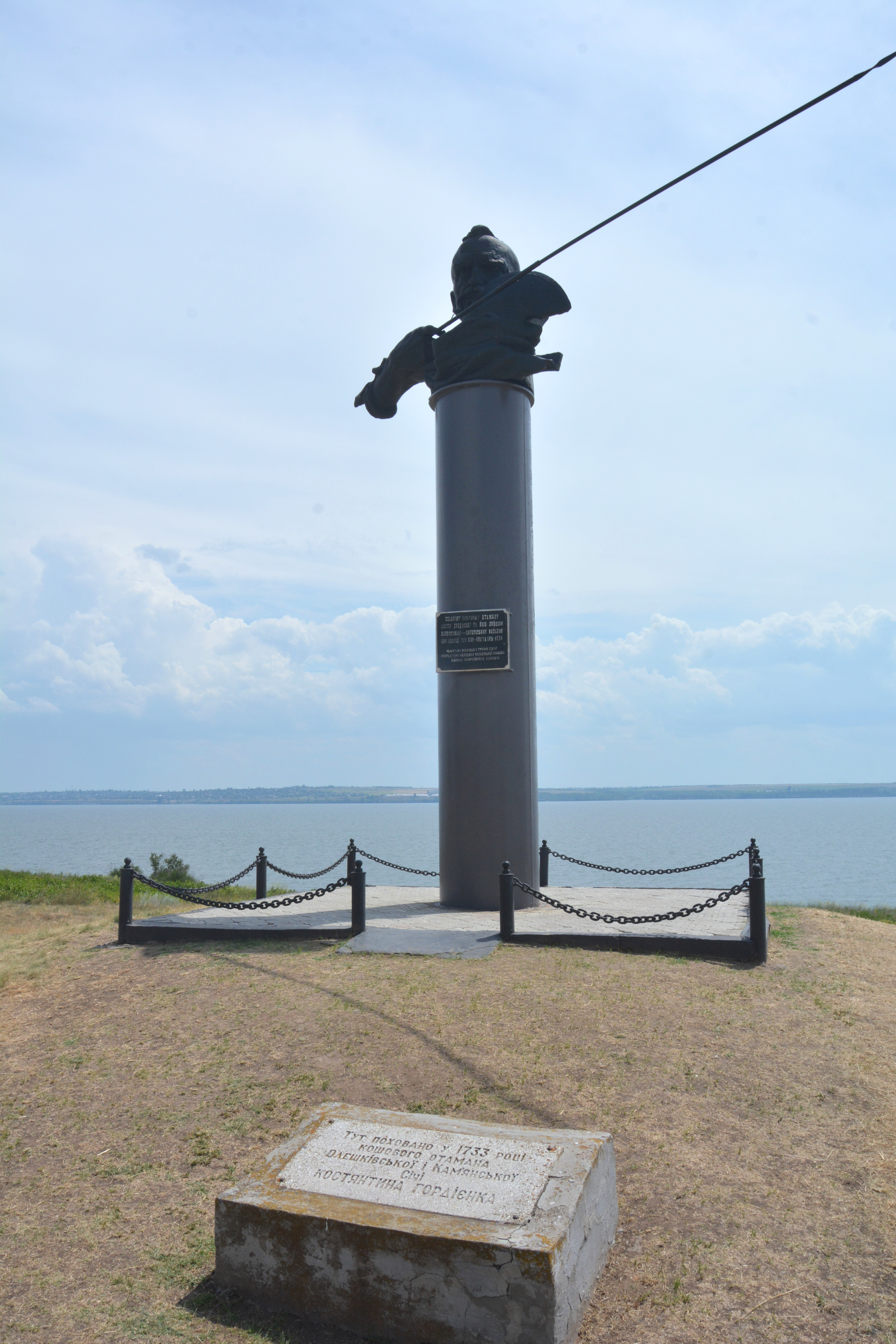 Кам'янська Січ, кладовище запорізьких козаків і могила кошового отамана Костя Гордієнка, с.Республіканець